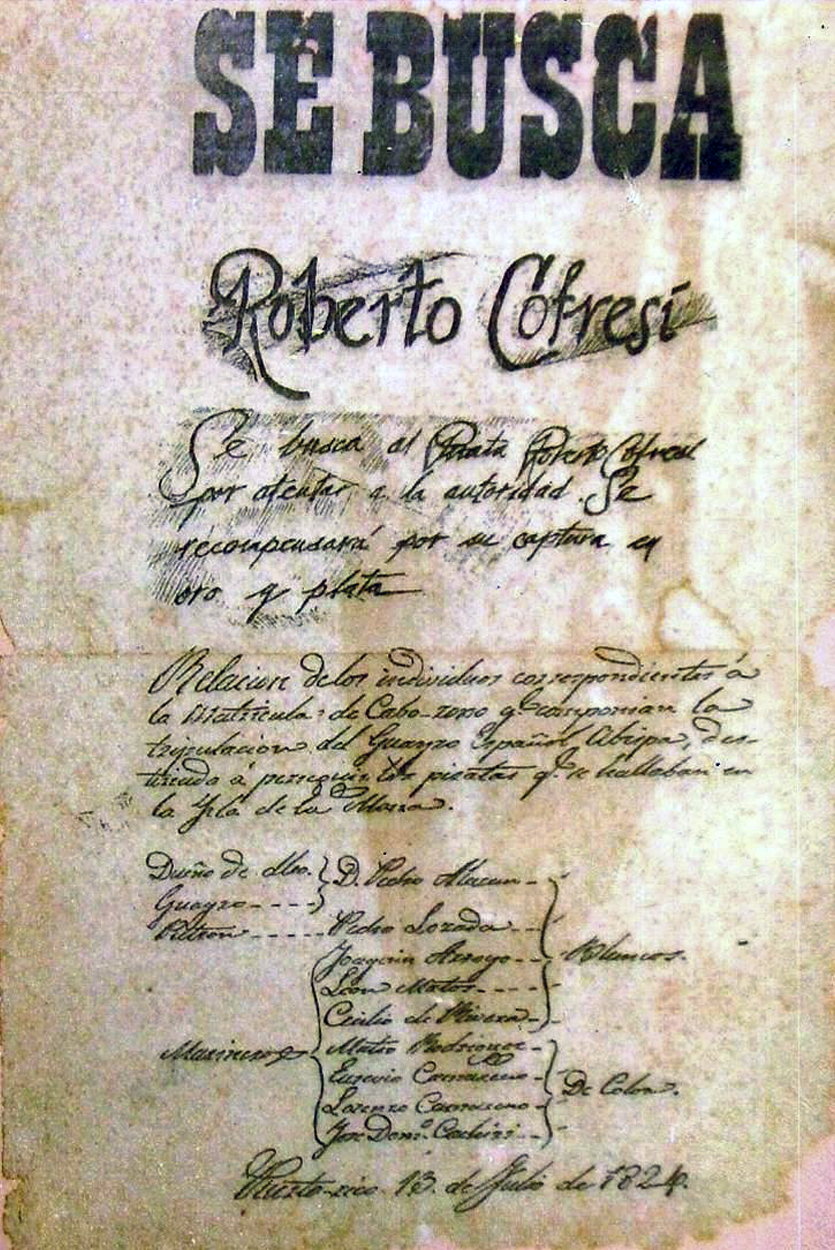 Documento de Captura del Pirata Cofresí